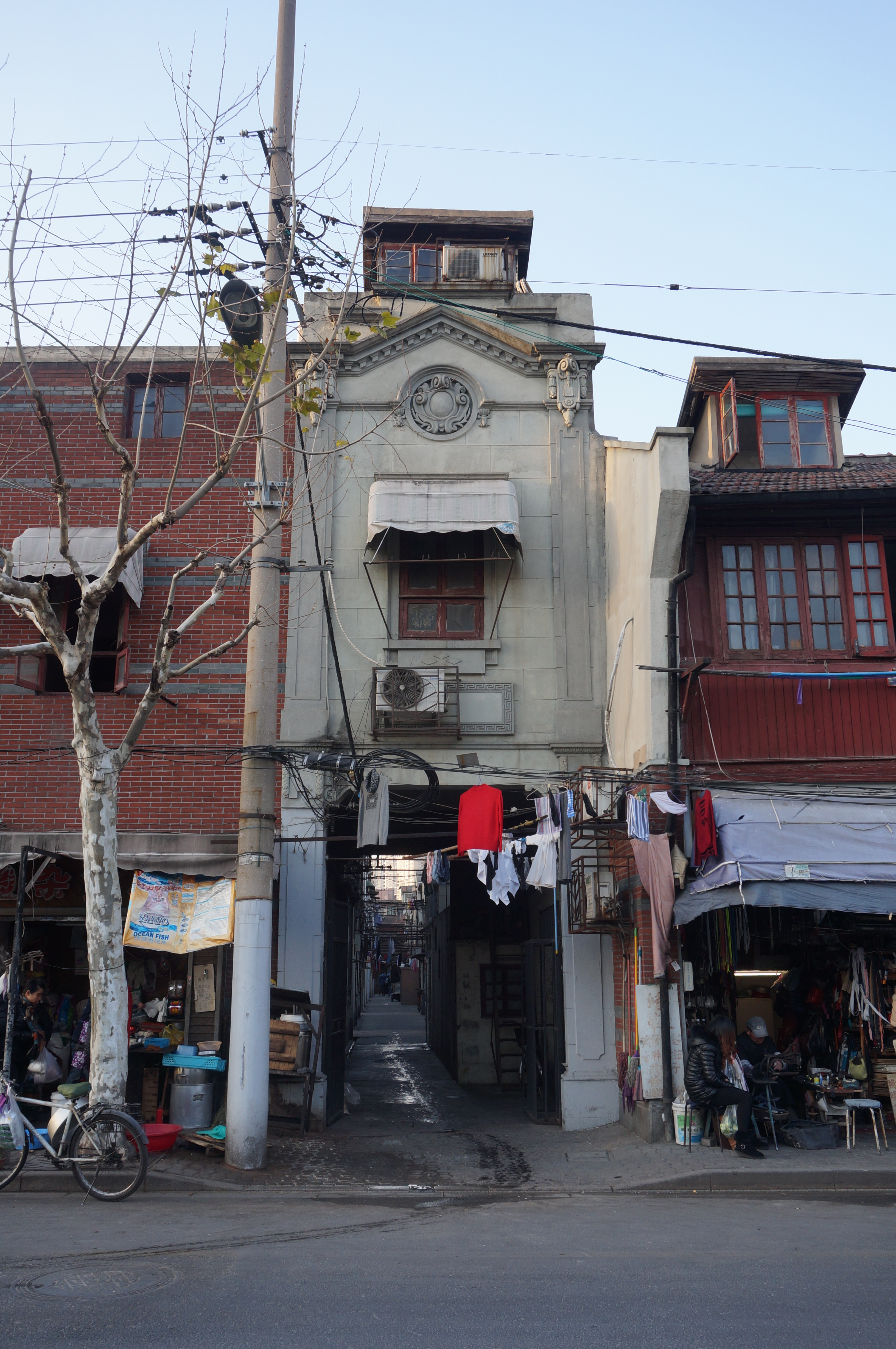 山海关路上的一篇石库门的入口